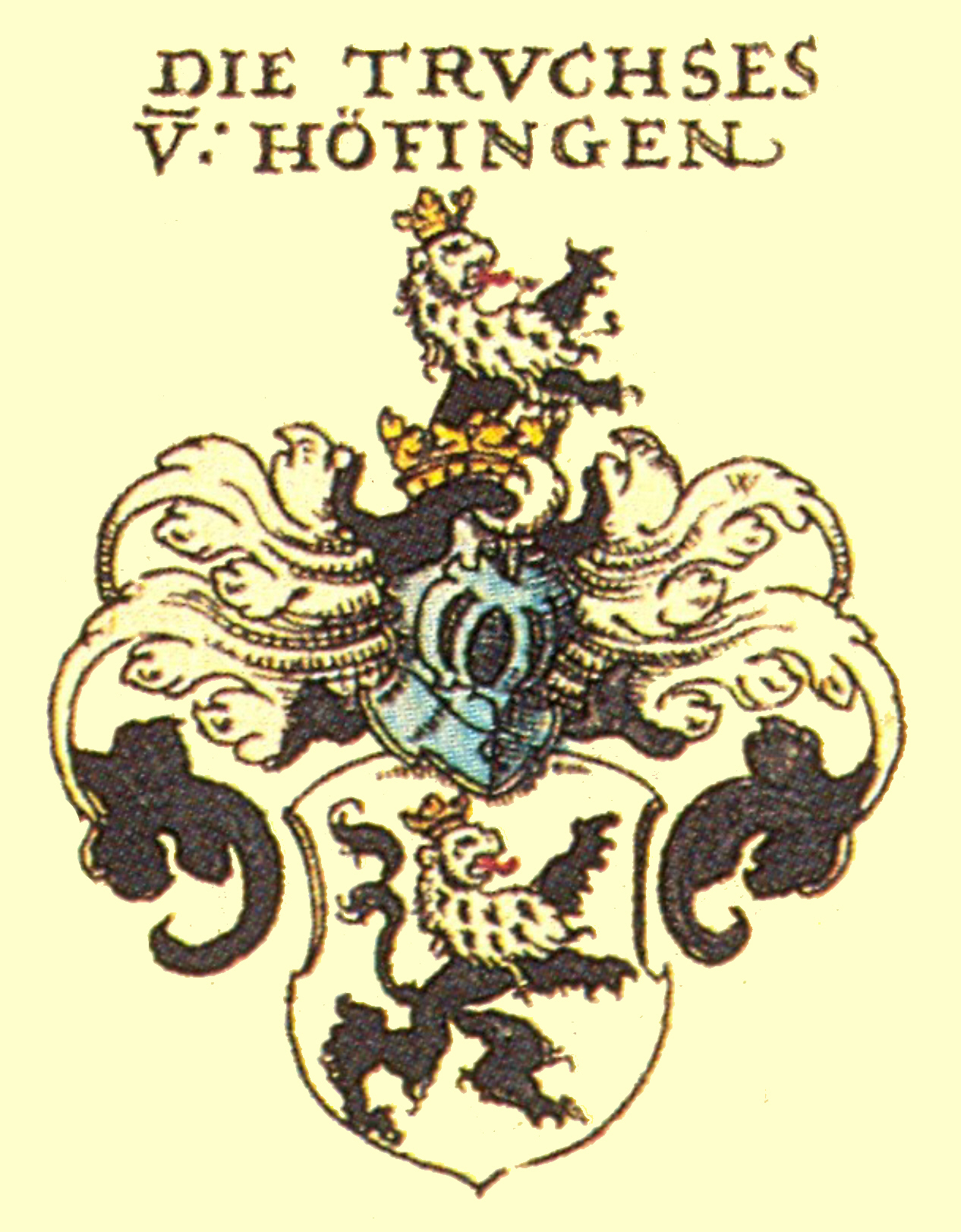 Wappen der Schwäbischen Adelsfamilie Truchsess von Höfingen